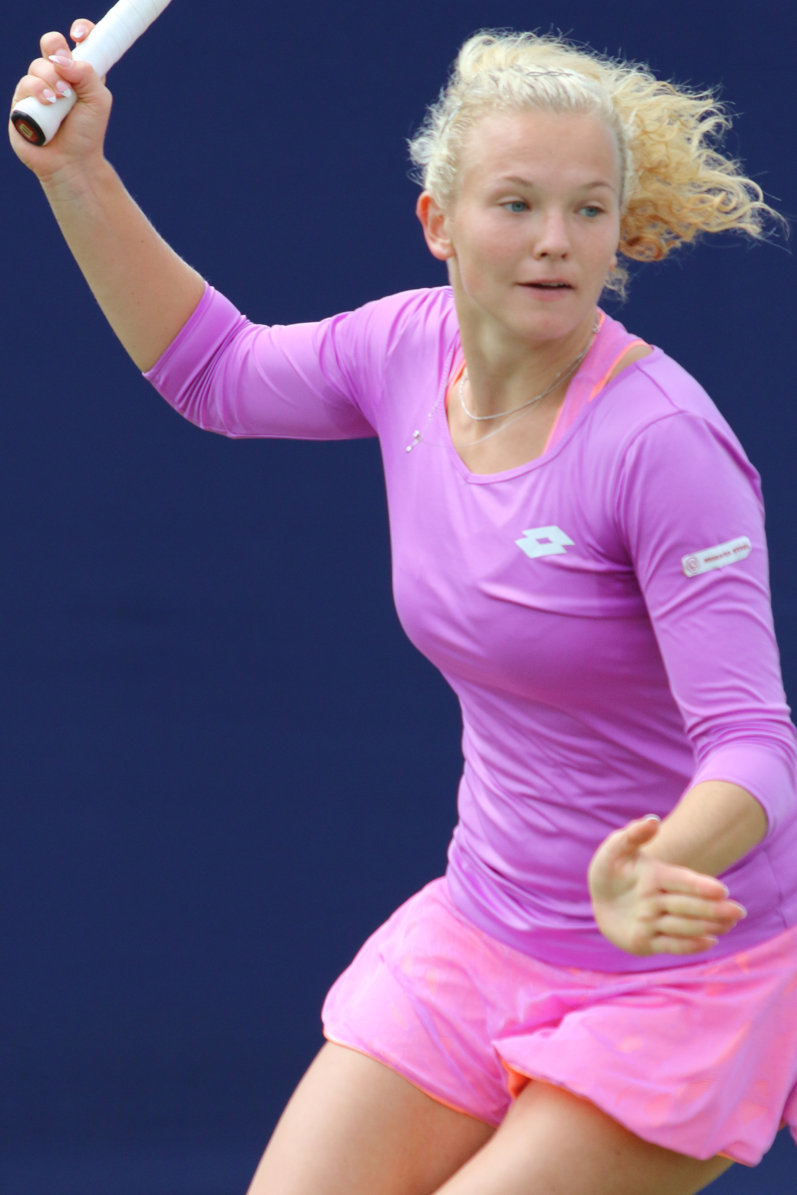 Siniakova EBN17 (8)